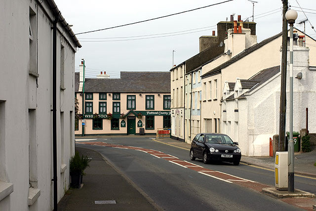 Ballasalla - main road